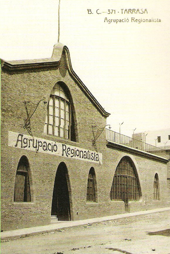 Seu de l'Agrupació Regionalista a Terrassa (Vallès Occidental-Catalunya), obra de Lluís Muncunill i Parellada (1868-1931), realitzada el 1907 i enderrocada el 1961.